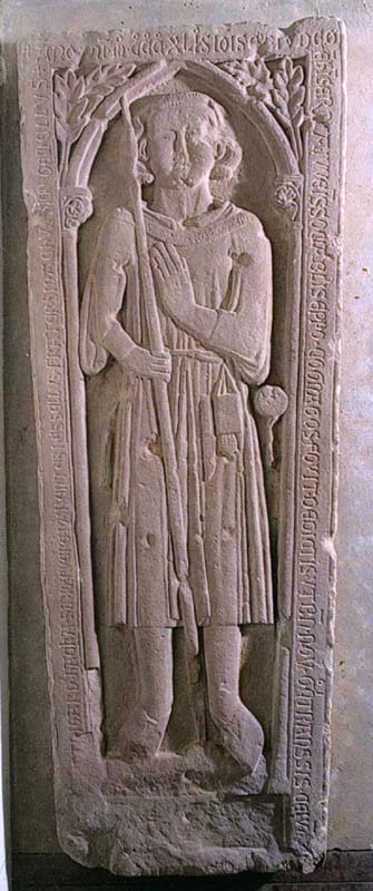 Grafsteen